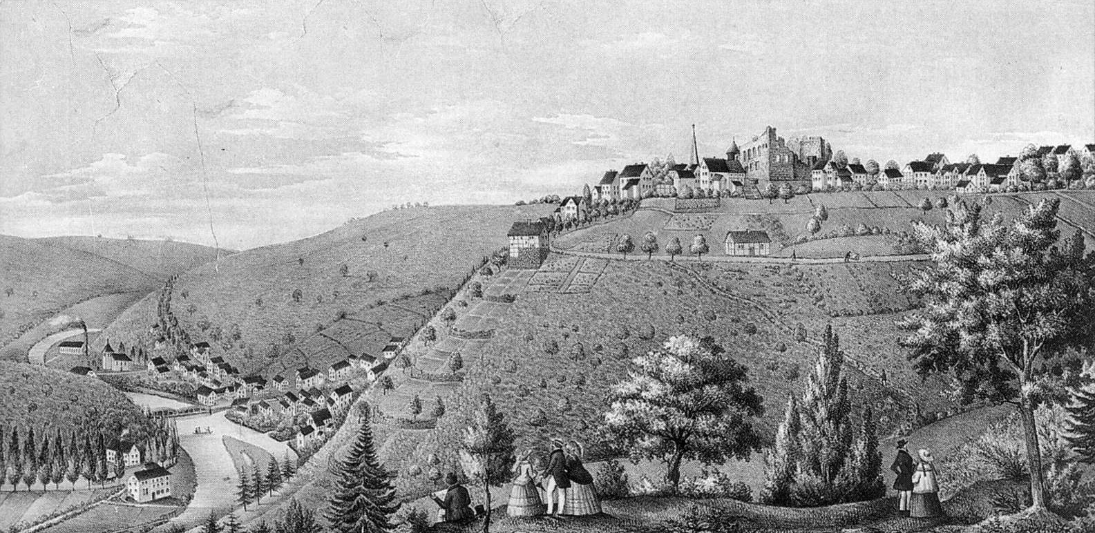 Lithografie des Schlosses Burg in Solingen